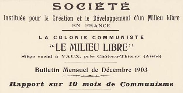 La Clairière de Vaux ou Milieu libre de Vaux est une communauté libertaire fondée à Essômes-sur-Marne dans l'Aisne en 1902.